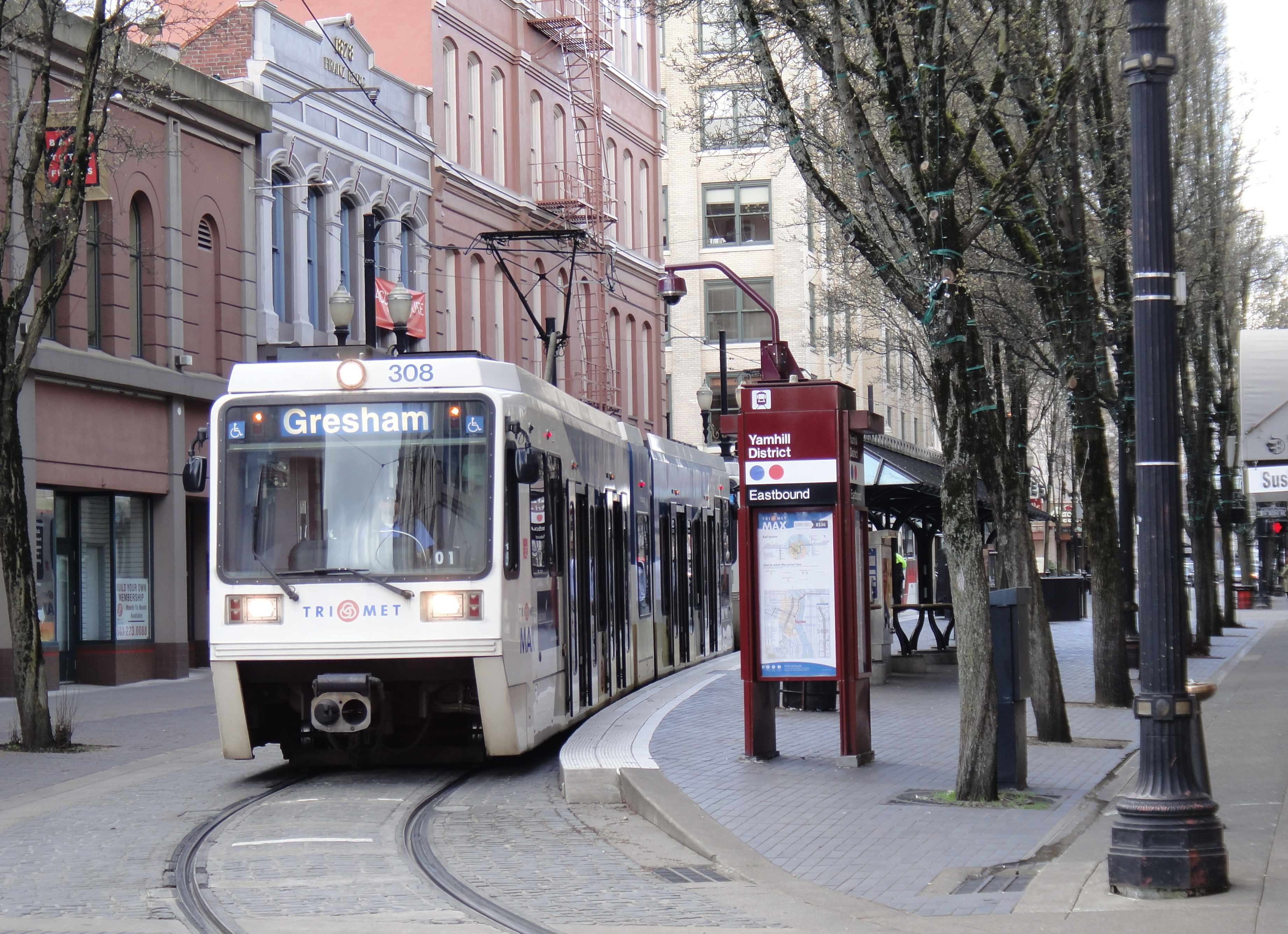 Für den Nahverkehr in Portland entwickelte INIT ein kontenbasiertes Ticketingsystem.